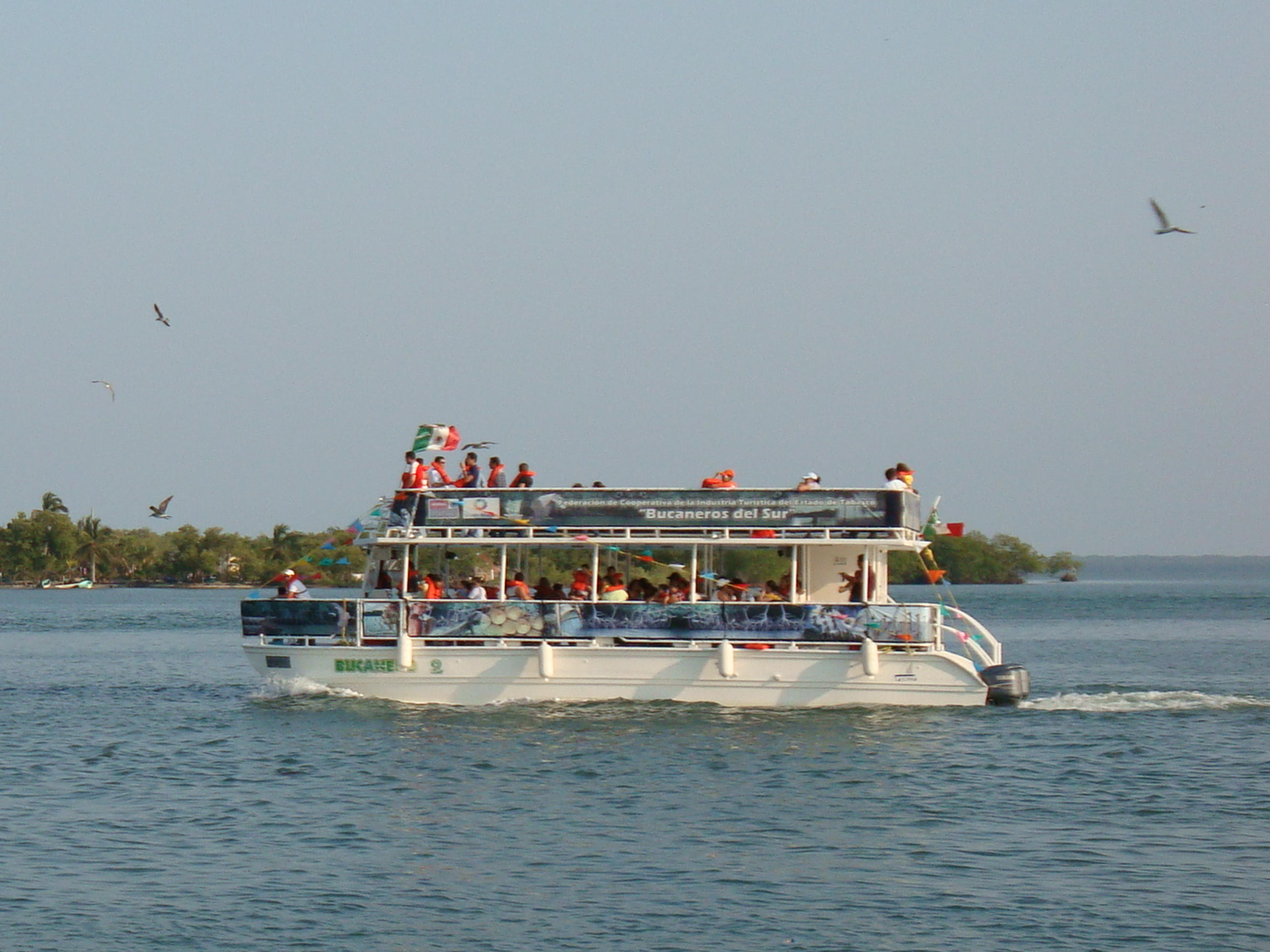 Catamarán turístico, en el centro turístico Puerto Ceiba, Paraíso, Tabasco.